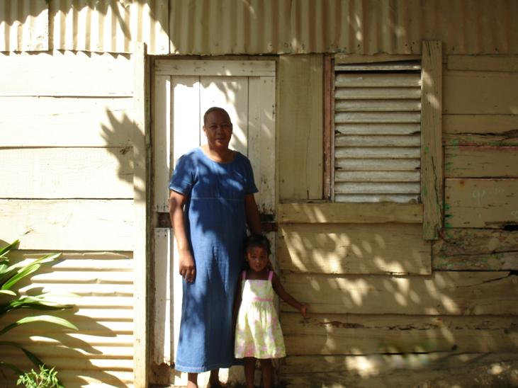 Una de las primeras casas construidas en el barrio Las Colinas